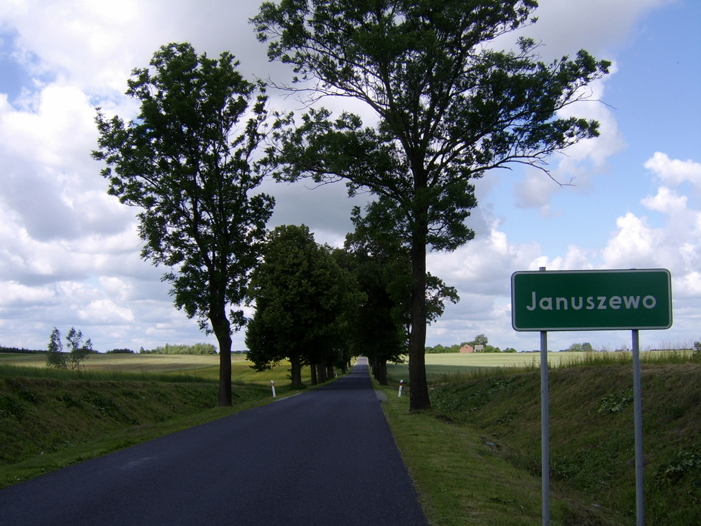 Tablica z nazwą miejscowości